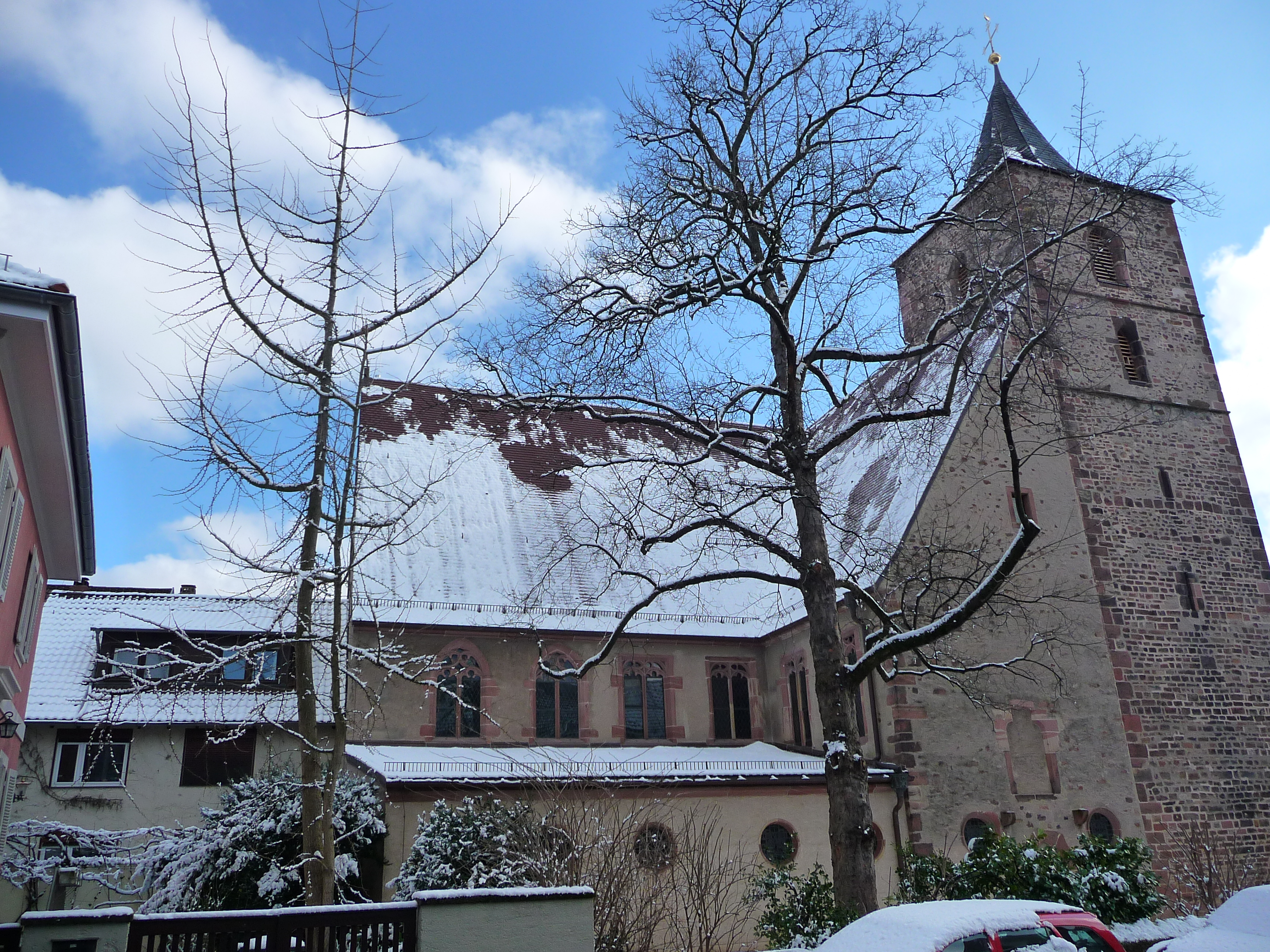 Katholische Kirche St. Vitus in Heidelberg-Handschuhsheim (Deutschland) - Ansicht von Westen